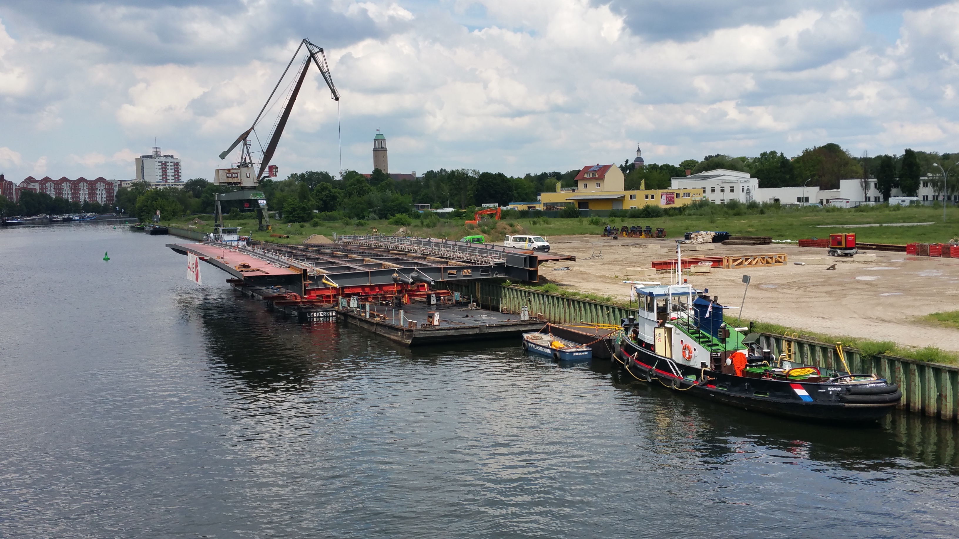 Das Fahrbahnteil (Stromfeld) der Freybrücke auf Potons verladen.